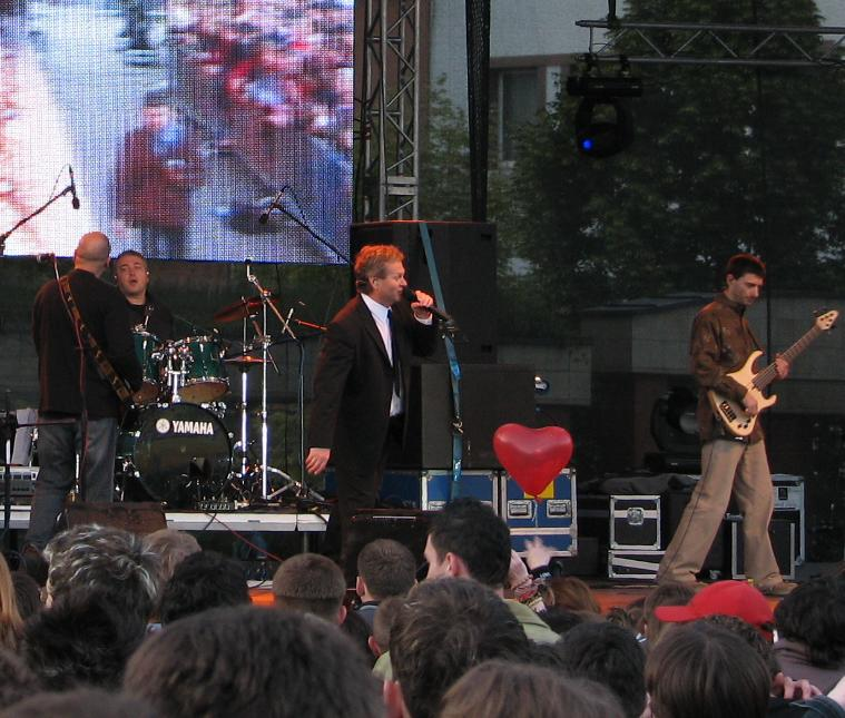 Skupina Vidiek v roku 2006.